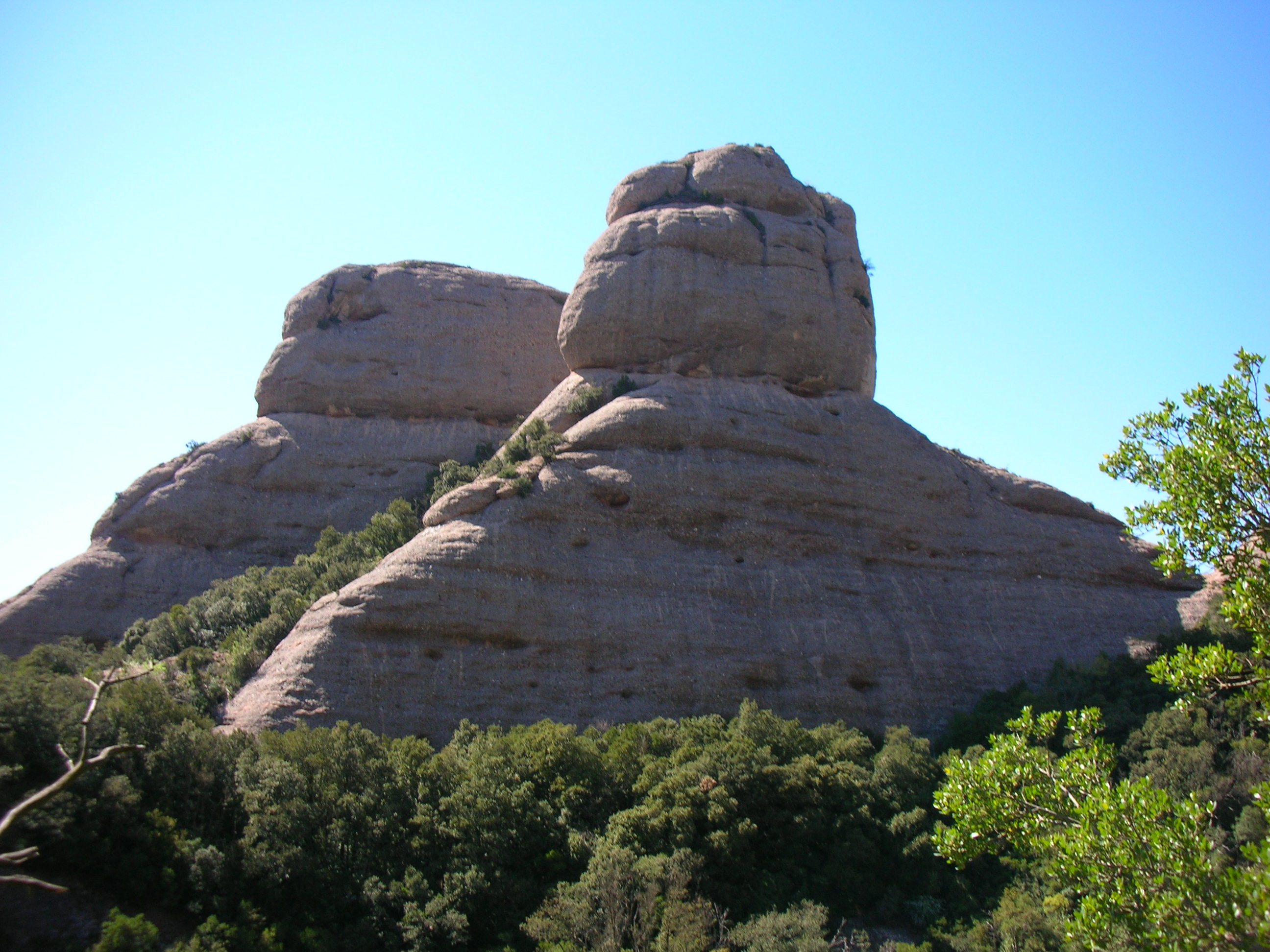 El Cilindre o Cabrit, Montserrat, Catalunya